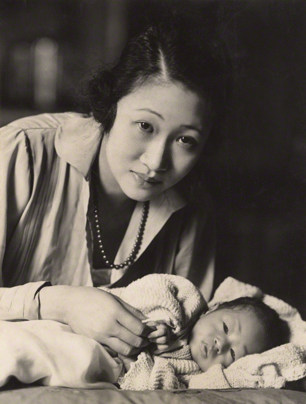 Madame Wellington Koo (née Hui-lan Oei) (1899-1992)